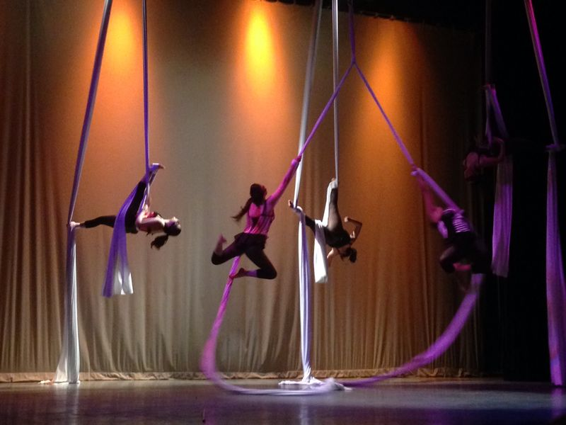 Presentación de Danza Aérea